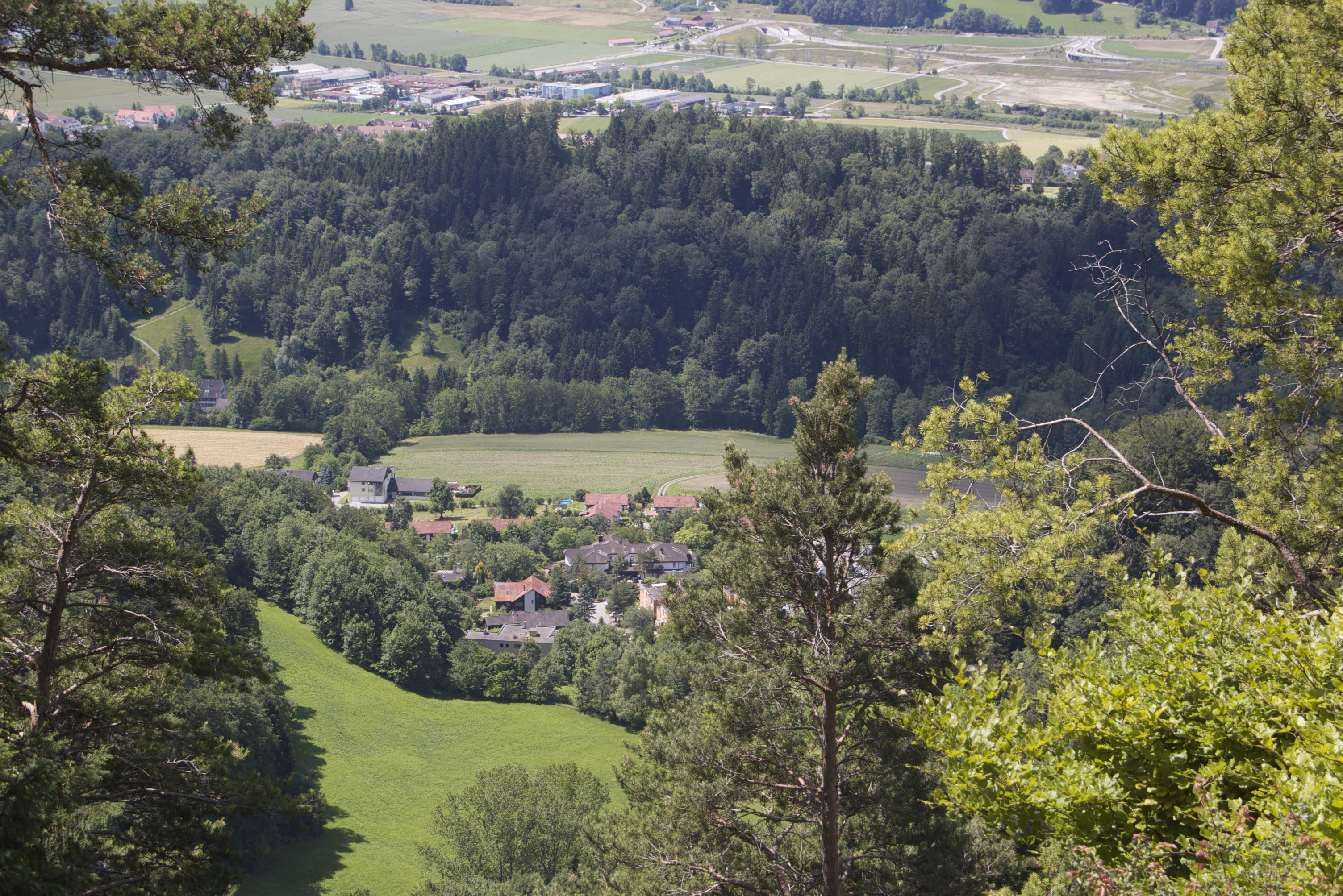 Blick von der Station Ütliberg über Weidelacker und Langfurren zu Sellenbüren auf den Näfenhügel vor Wettswil.